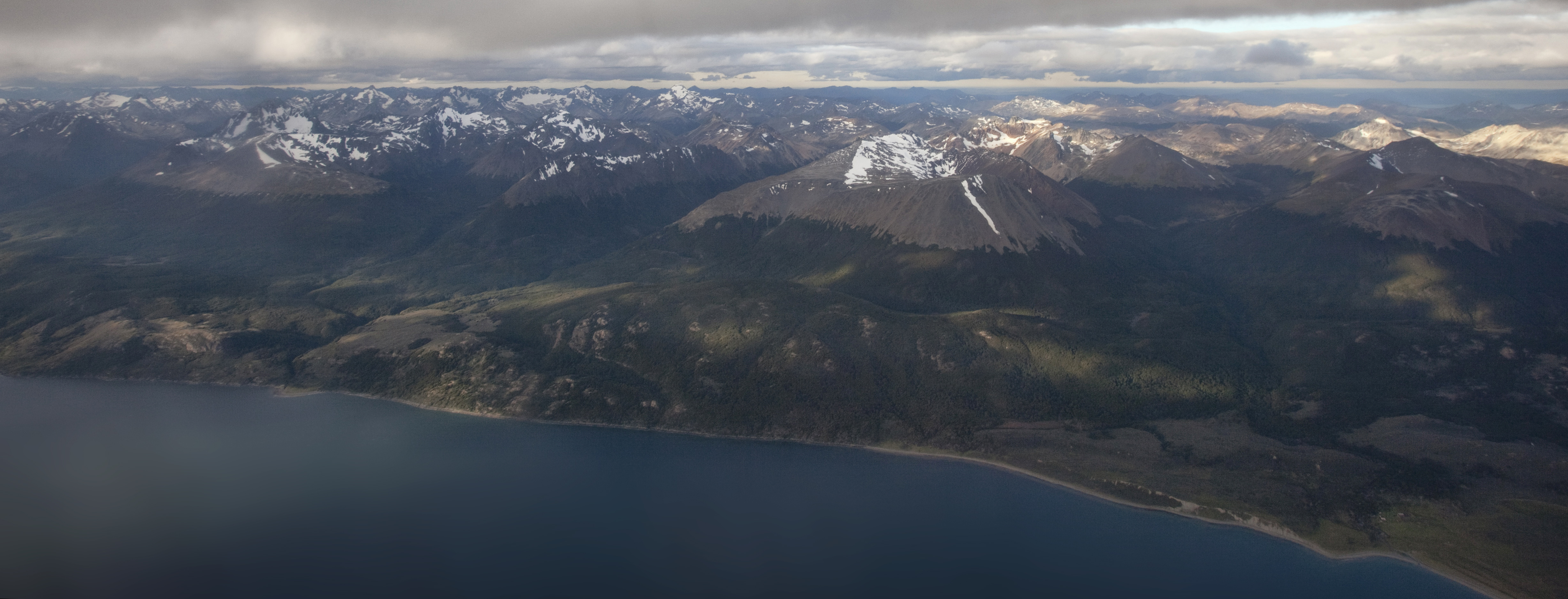 Isla Grande de Tierra del Fuego